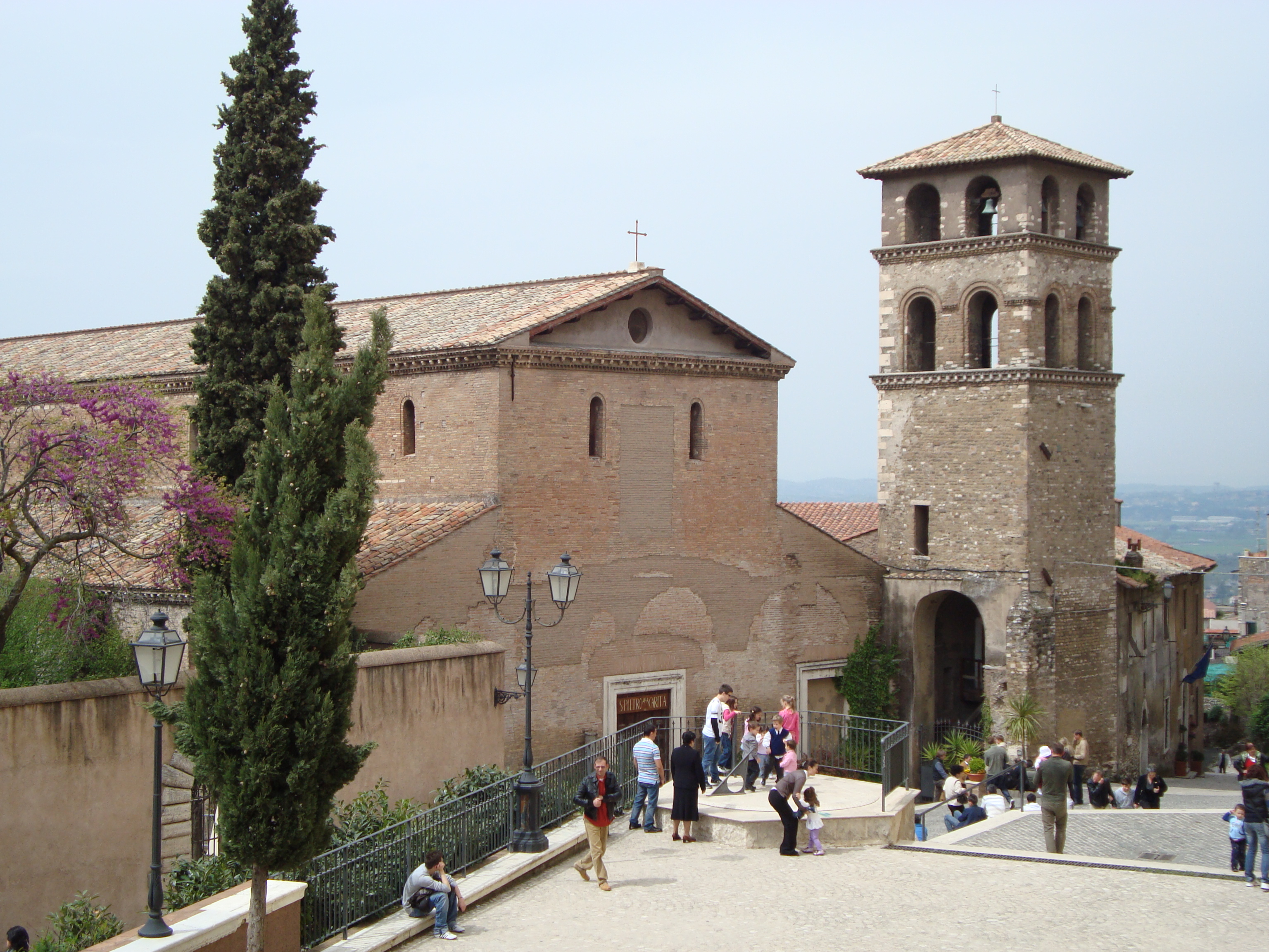 L'église San Pietro alla Carita de Tivoli dans le Latium